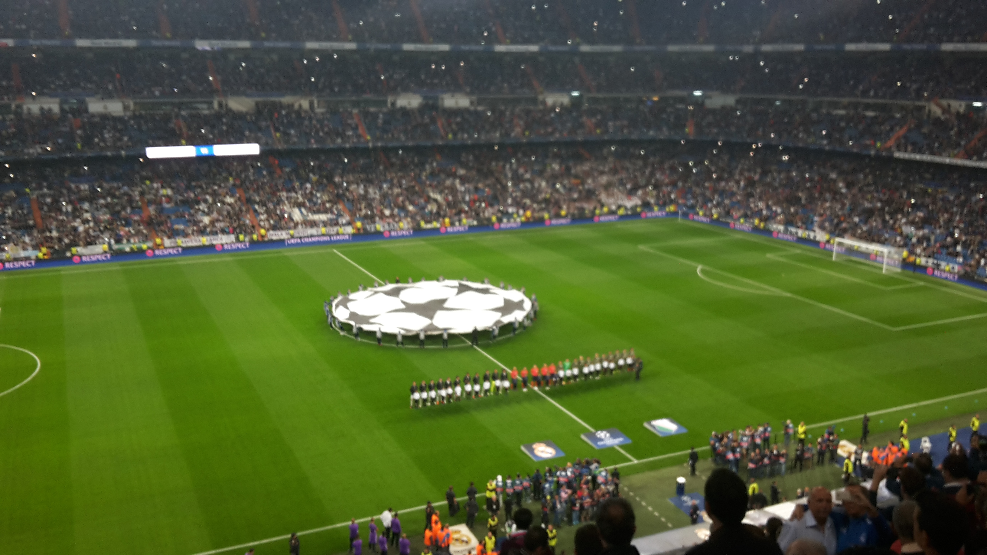 Real Madrid-Legia Warsaw